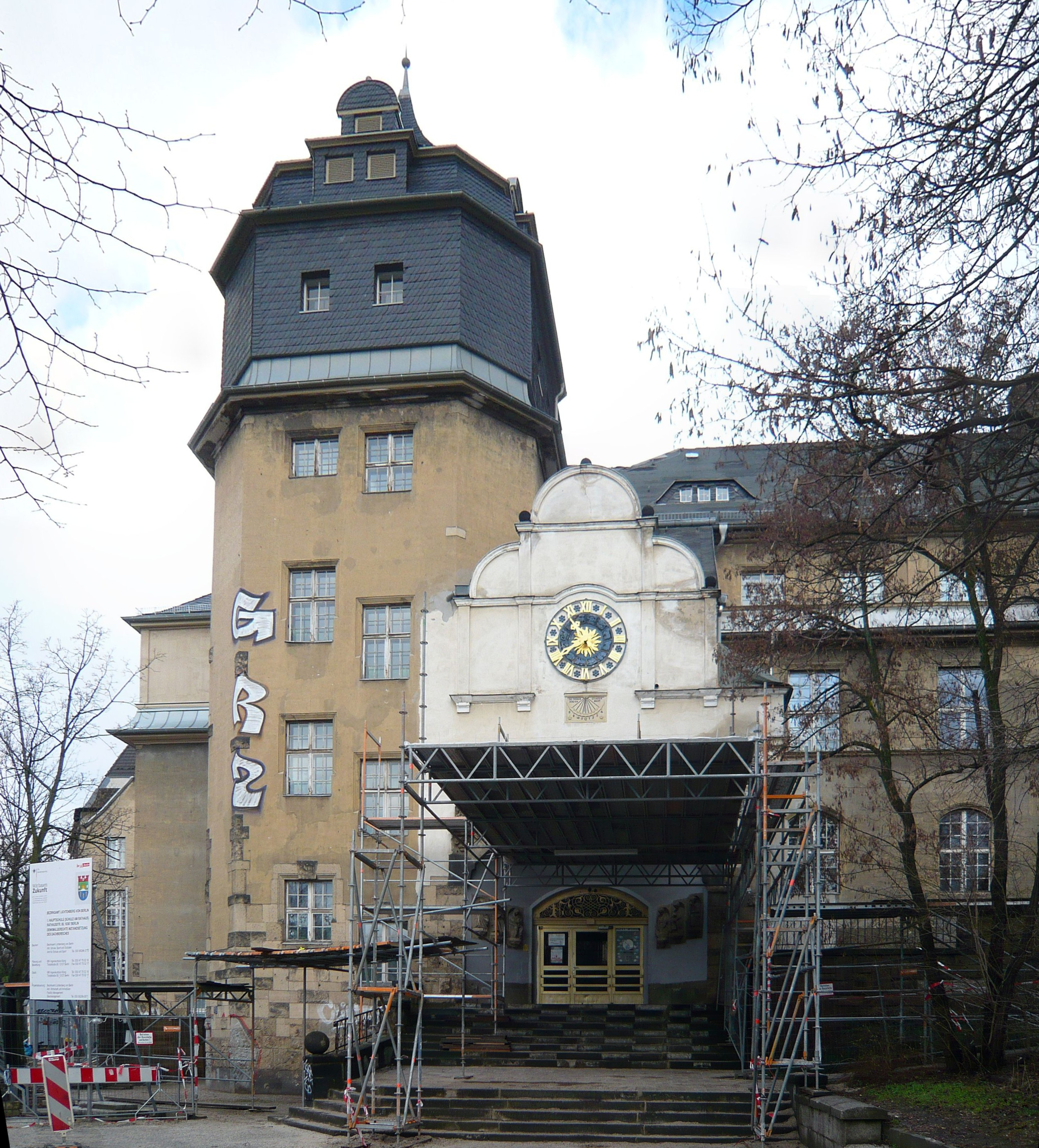 Berlin-Lichtenberg, eh. Cecilien-Lyzeum